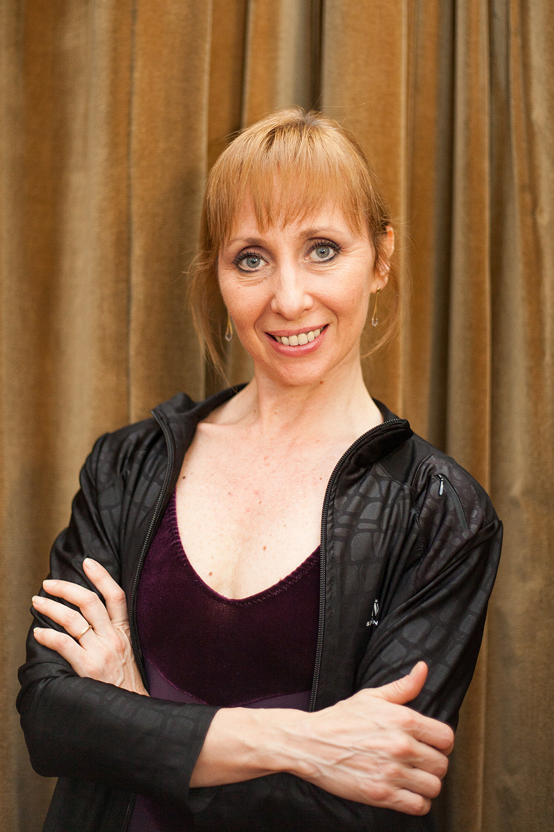 El sábado 22 de diciembre de 2012 a las 20,30 hs. Eleonora Cassano se despedirá de la danza clásica con un gran espectáculo gratuito en la Plaza de la República, al lado del Obelisco.